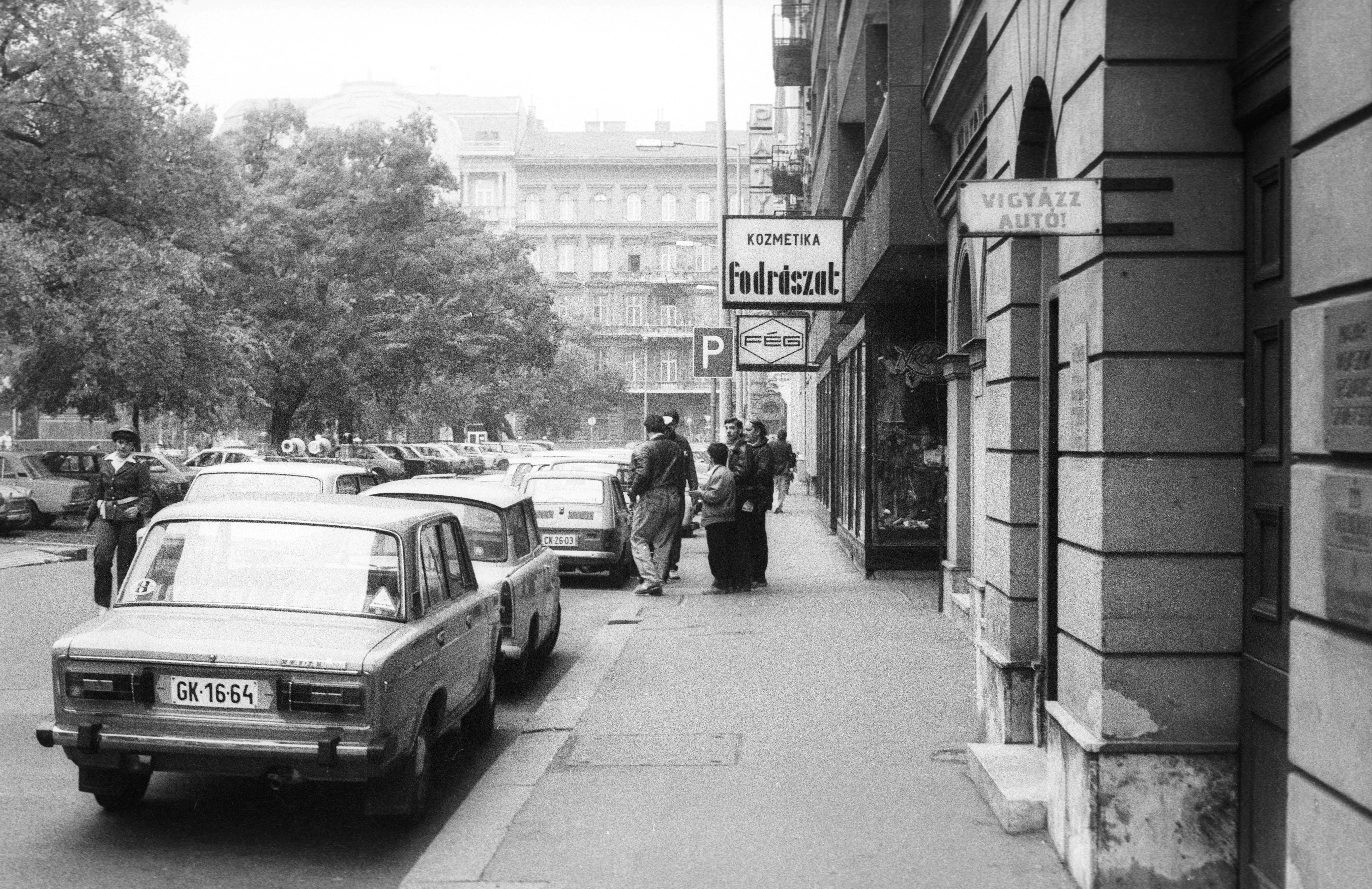 József nádor tér a József Attila utca felé nézve. Location: Hungary, Budapest V. Tags: automobile, Soviet brand, Lada-brand, hairdresser, Budapest Title: József nádor tér a József Attila utca felé nézve.